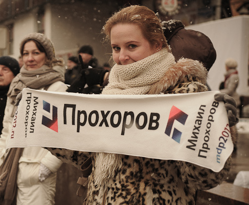 26 февраля 2012, в Москве, прошла акция за честные выборы. На протяжении всего Садового Кольца стояли люди и держались за руки. Проезжающие автомобили приветствовали их сигналами. По данным организаторов, численность участников составила свыше 30 000 человек.